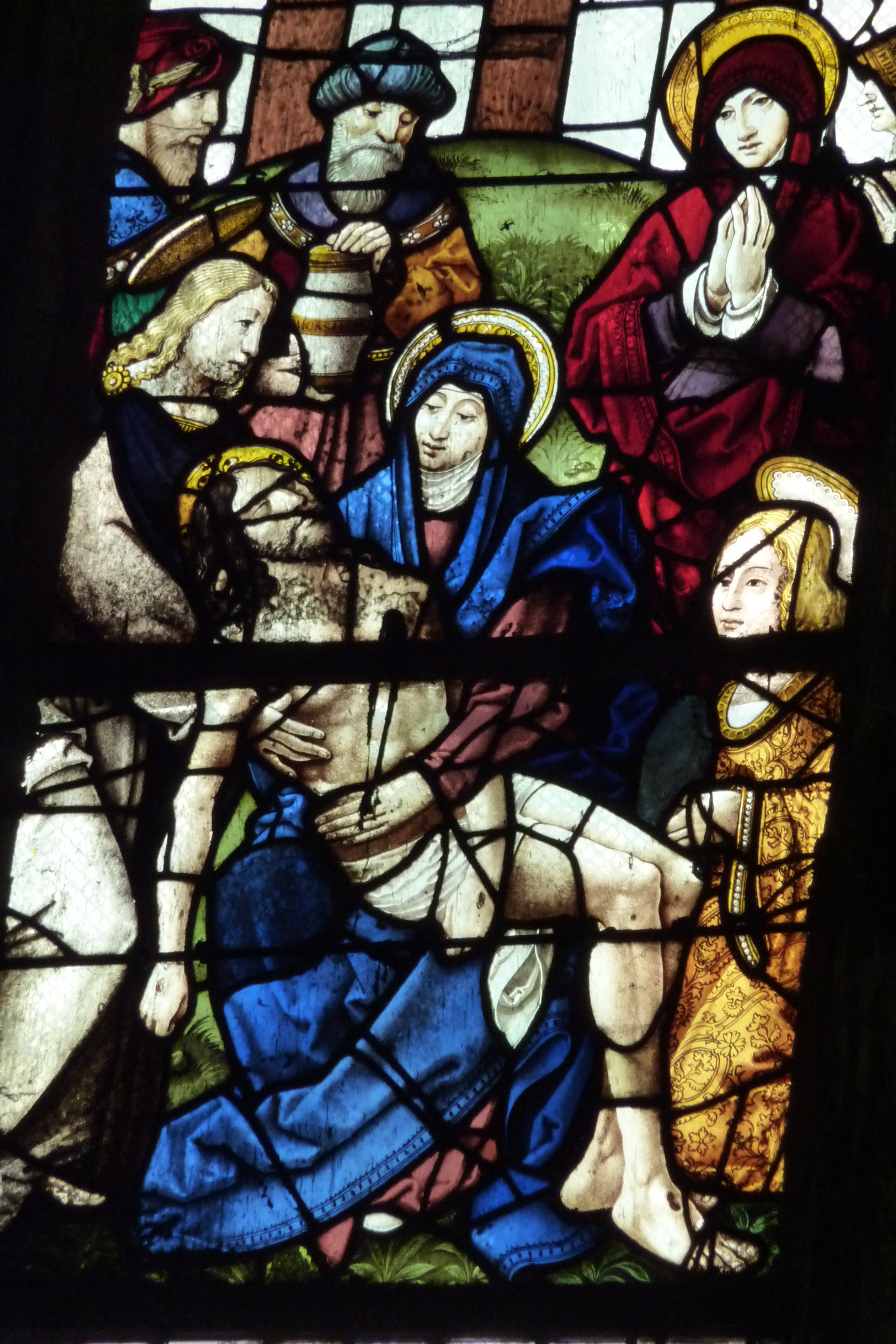 wiederverwendetes Bleiglasfenster aus dem 1. Viertel des 16. Jahrhunderts (Fenster 5, im Chor) in der katholischen Pfarrkirche Saint-Merry in Paris, Darstellung: Kreuzabnahme